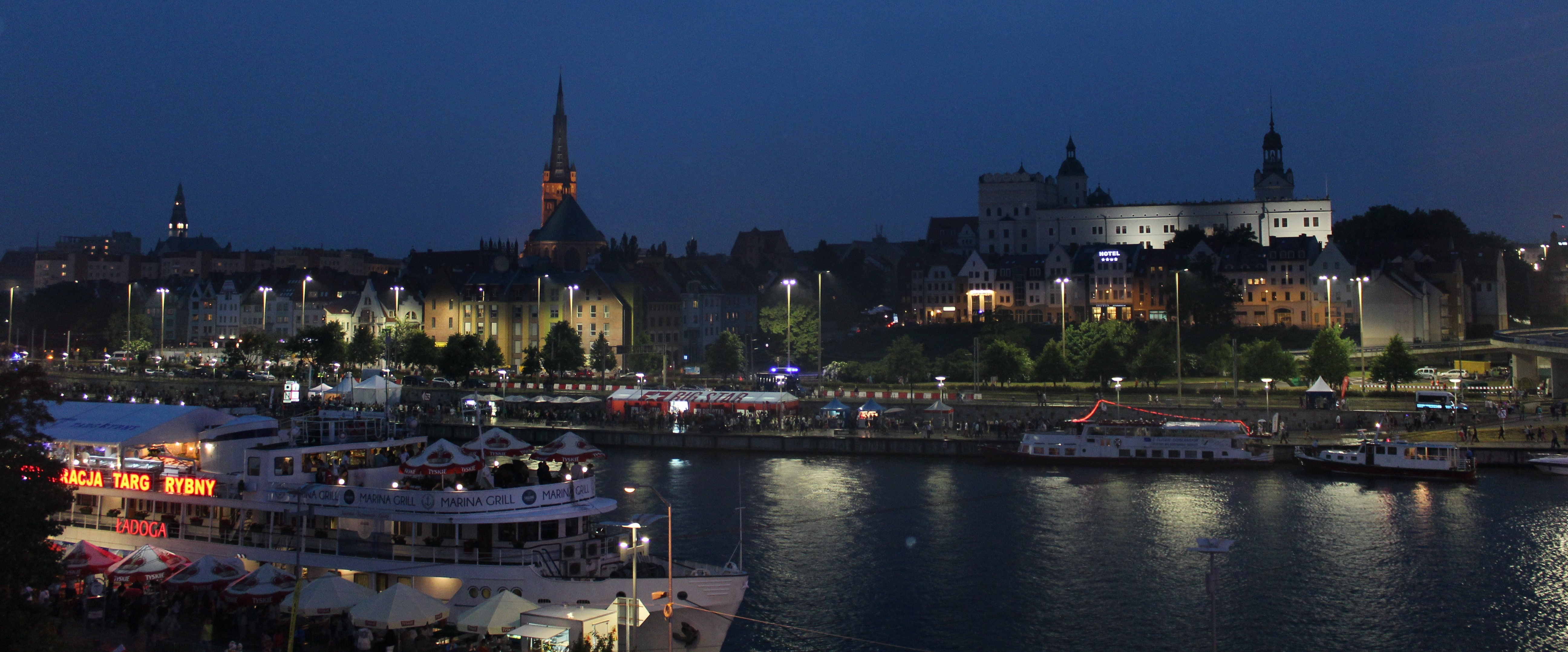 Stare Miasto w Szczecinie, 2015